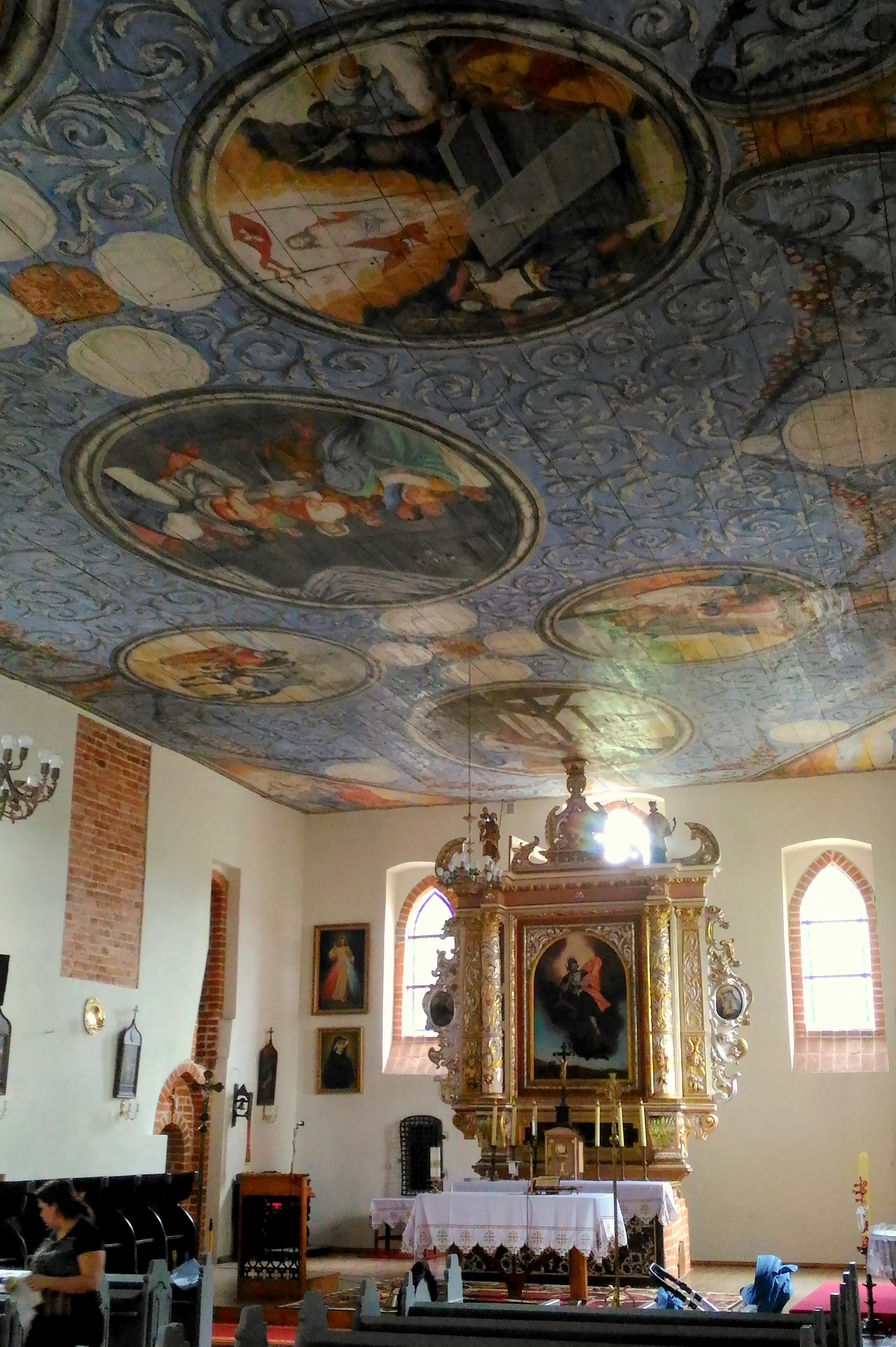 Wnętrze kościoła w Starej Kościelnicy